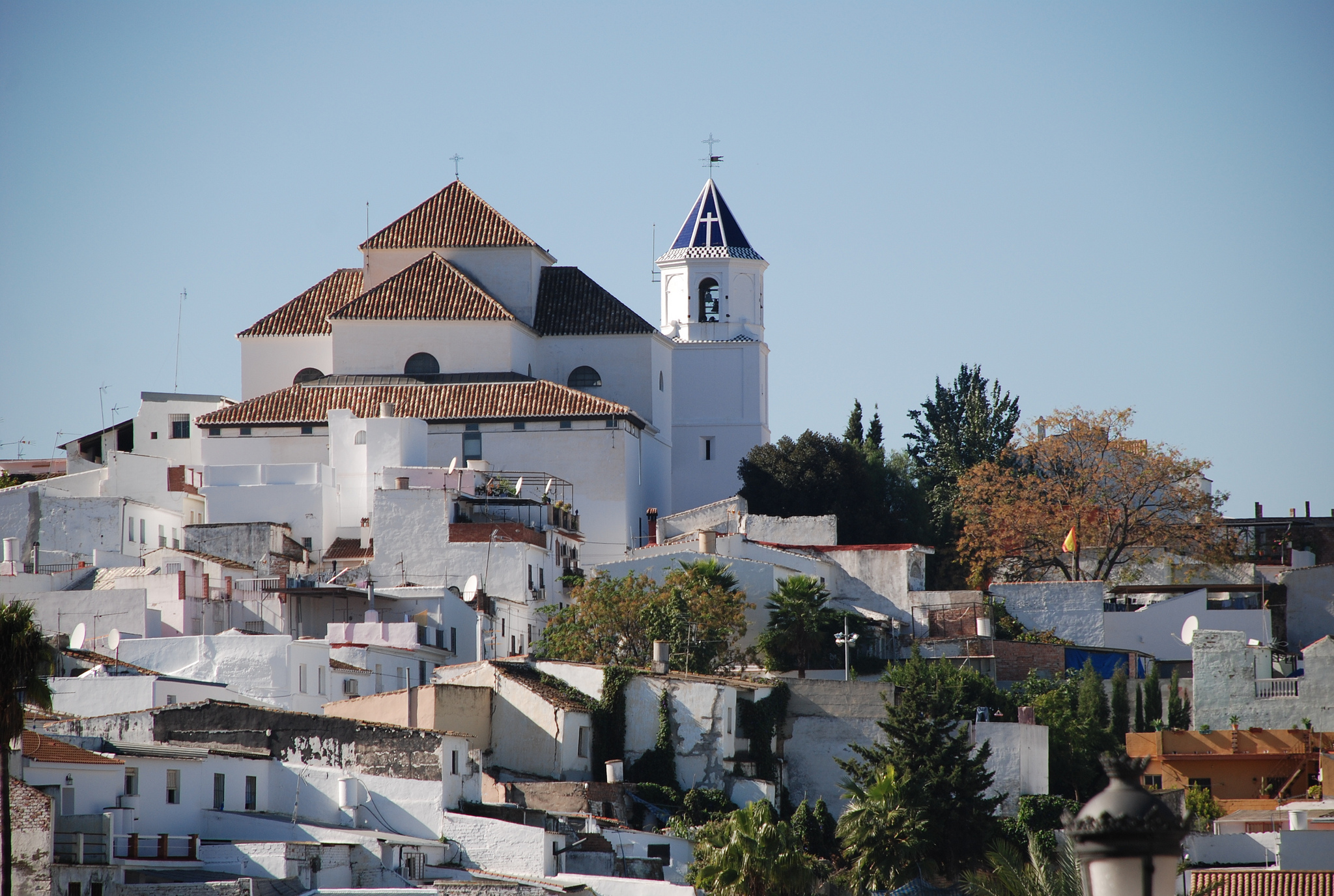 Vista de Alhaurín el Grande desde Carretera de Cártama.